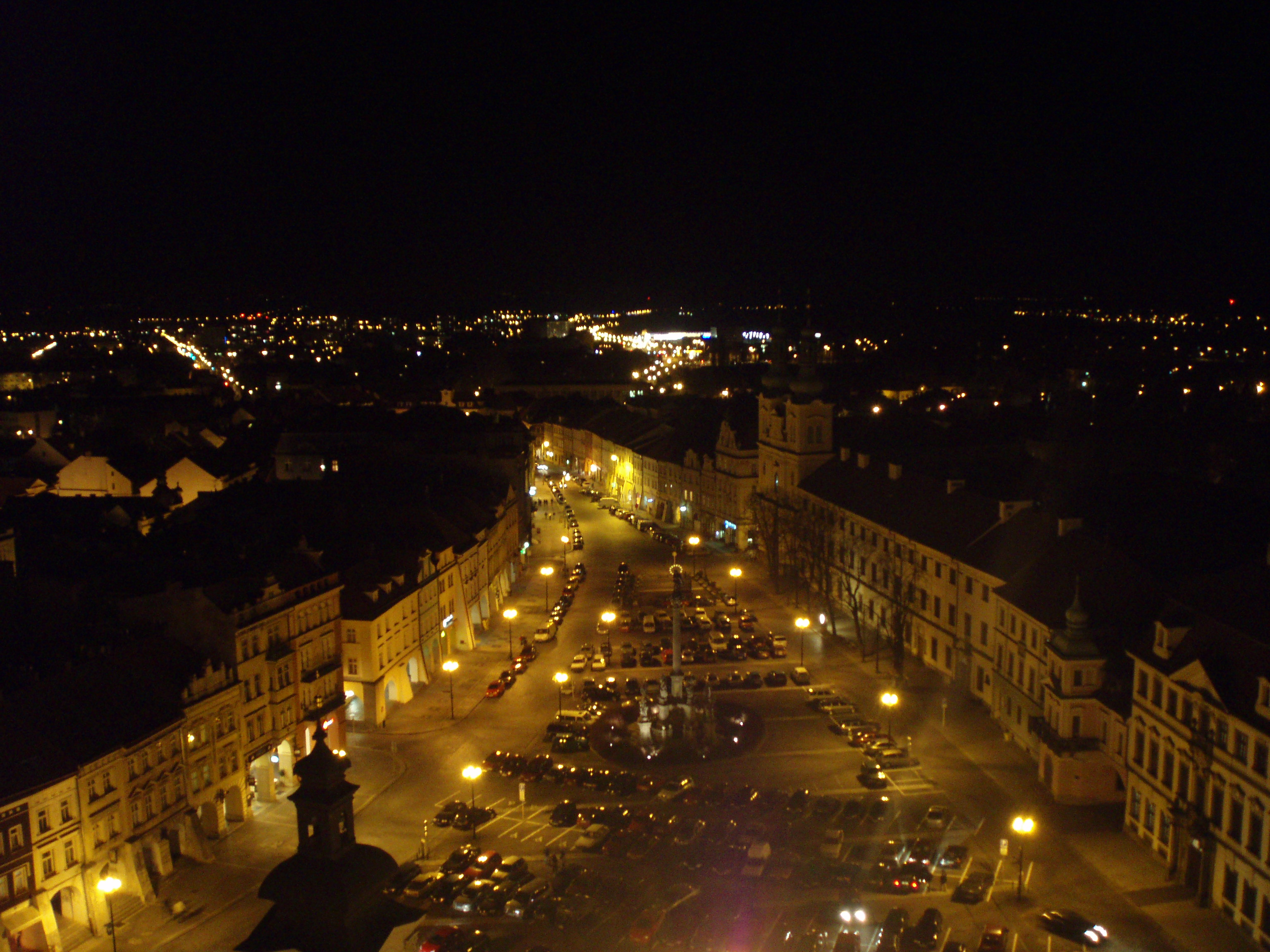 Pohled z Bílé věže na Velké náměstí a okolí..